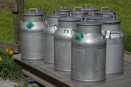 Isenthal: Milchkannen (Nr. 03.1-4734)